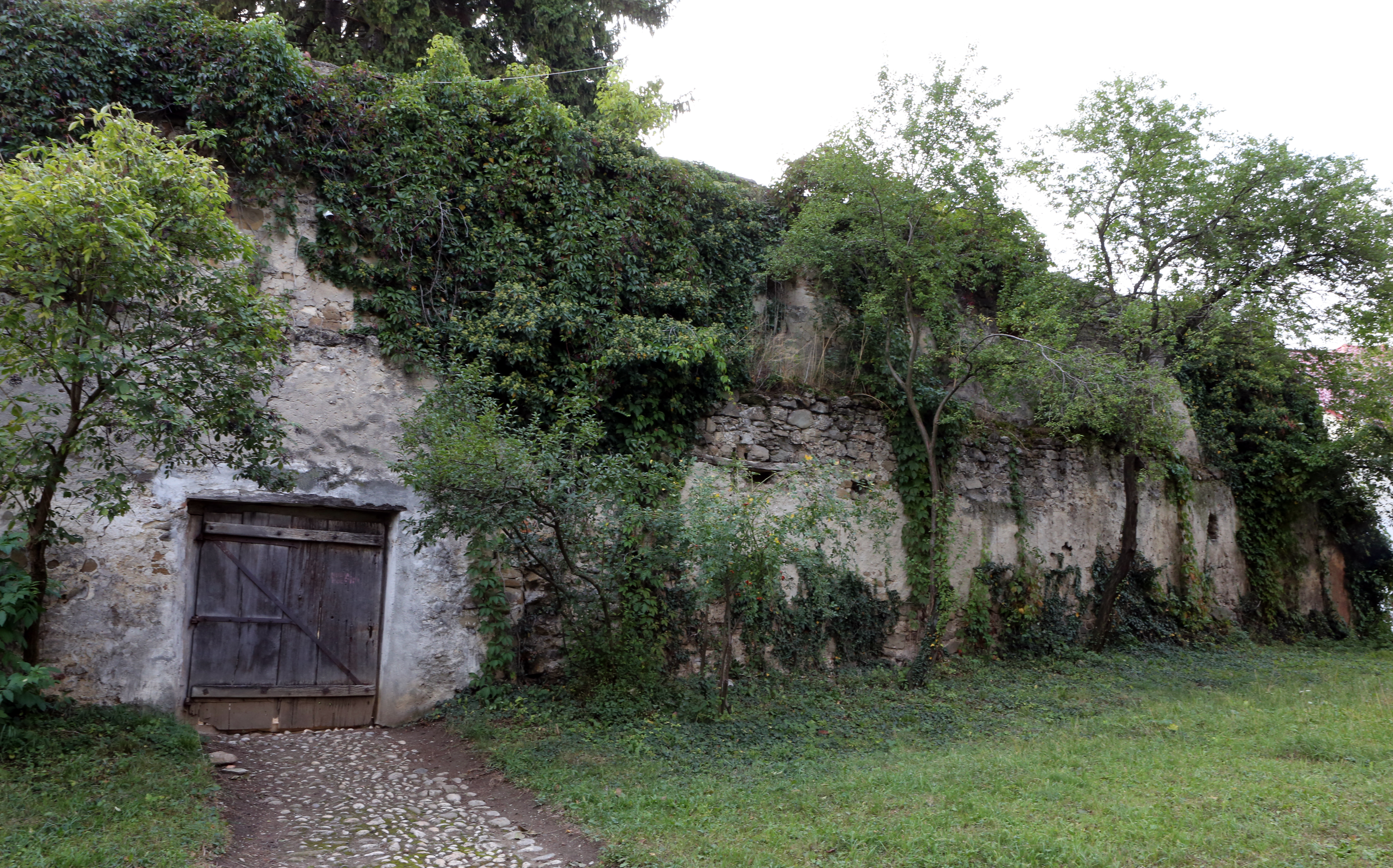 Incintă fortificată 02